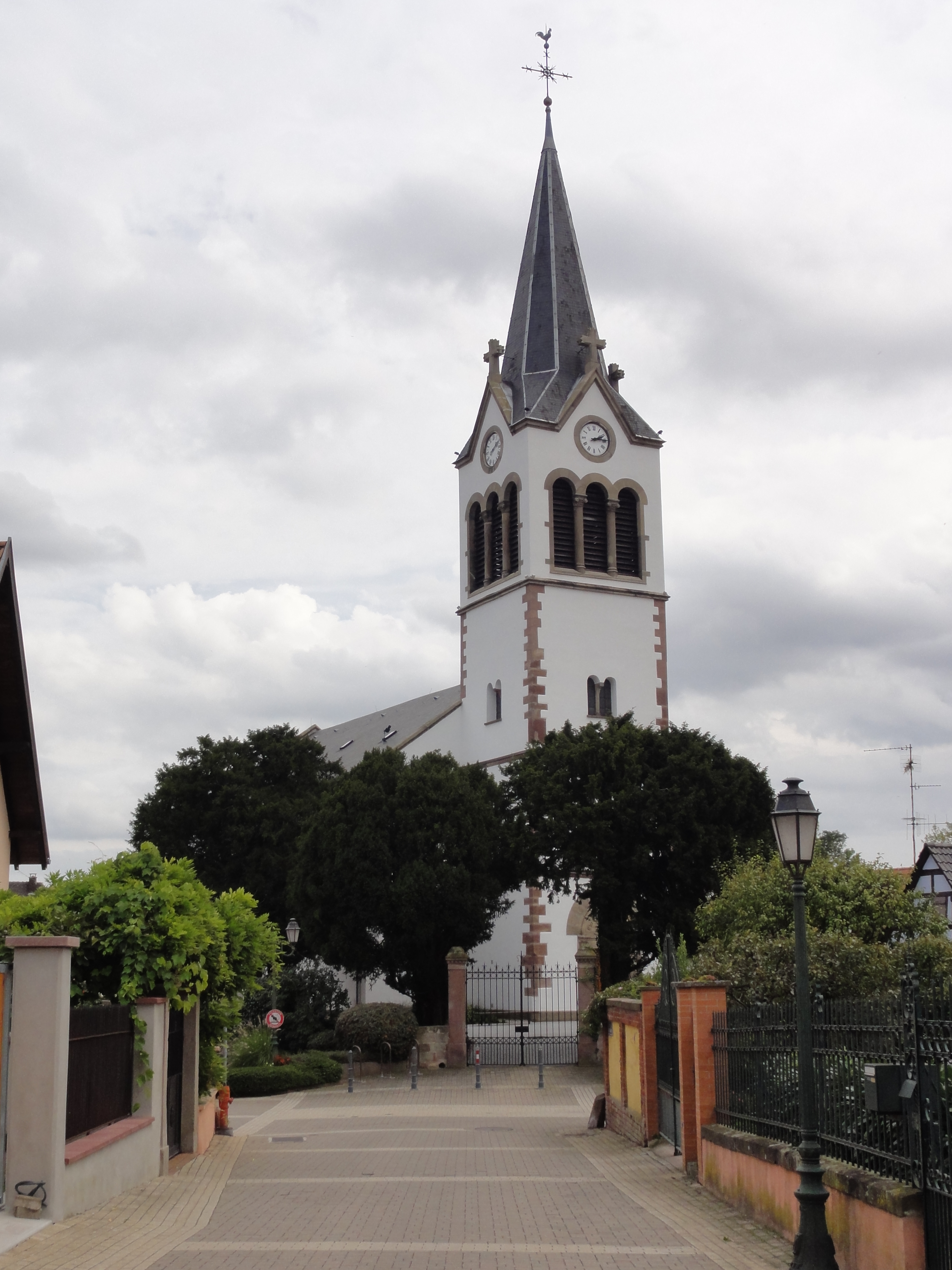 Alsace, Bas-Rhin, Église protestante de Lampertheim (IA67007219).